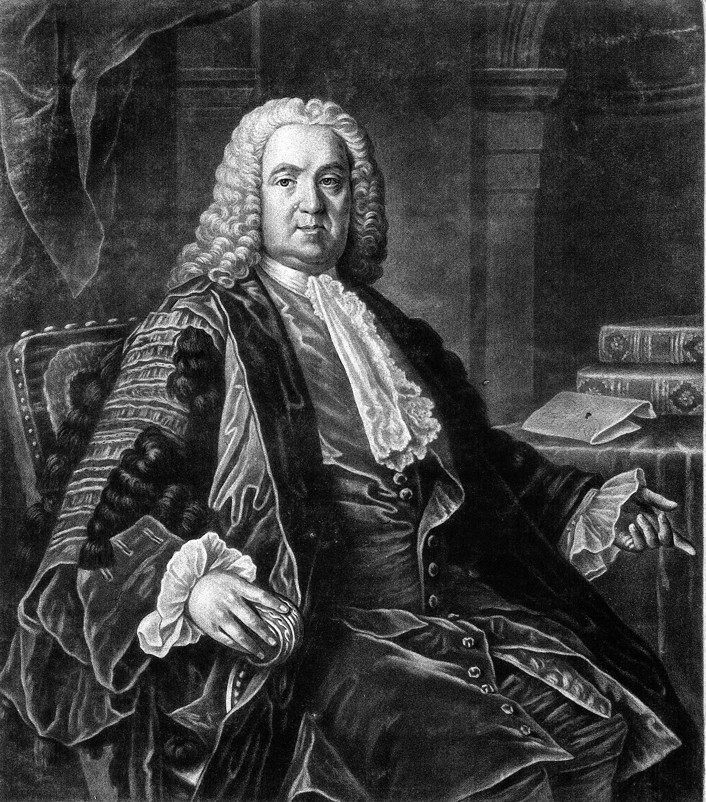 Portrait von Richard Mead